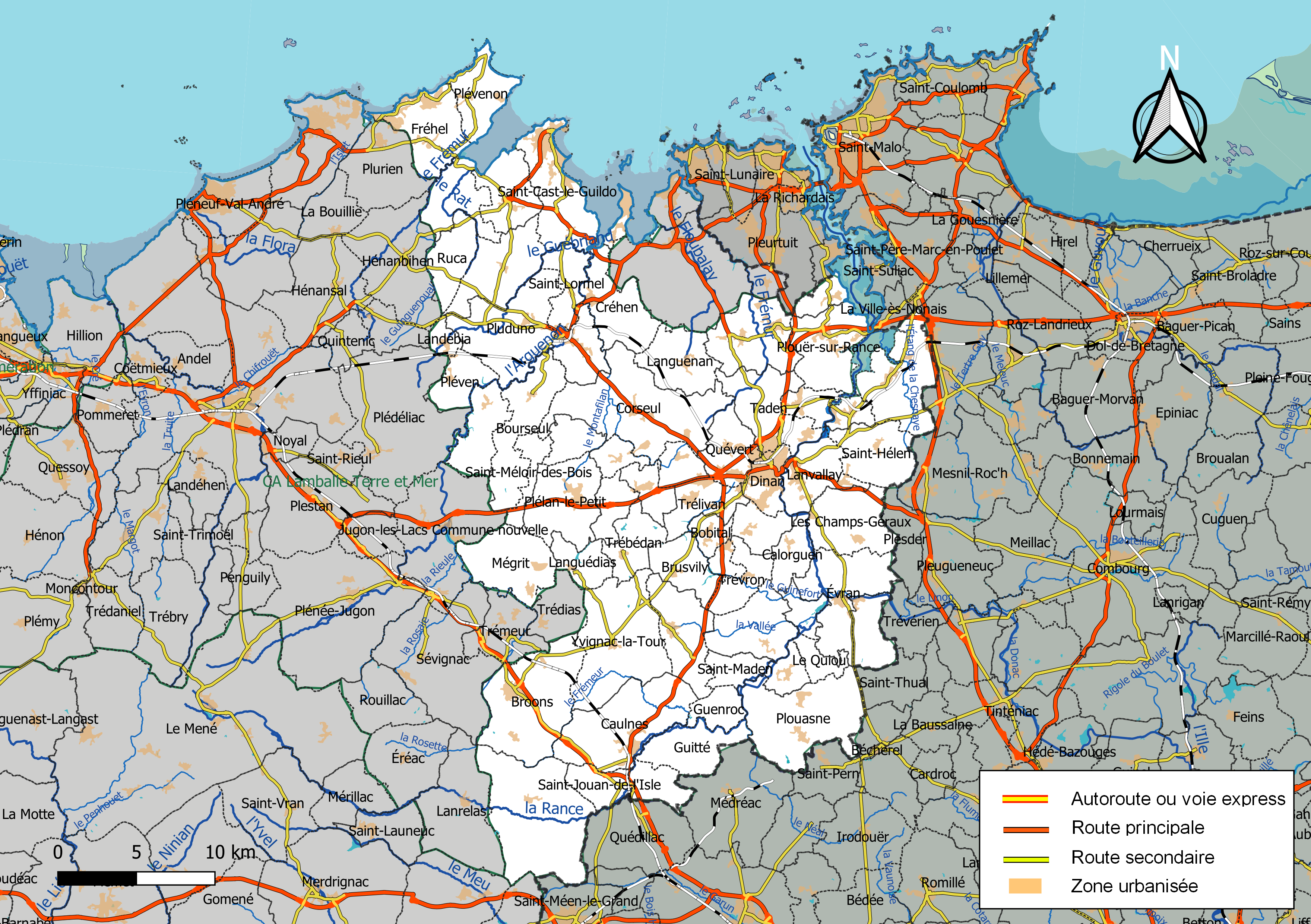 Carte géographique de l'intercommunalité Dinan Agglomération, département des Côtes-d'Armor, France. Composition au 1er janvier 2019.